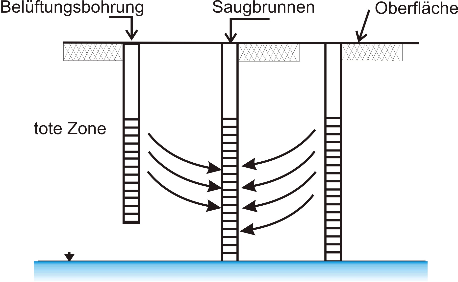 Absaugen von schädlichen Gasen und Dämpfen aus belastetem Erdreich zum Schutz des Grundwassers, Verlauf der Strömungen mit Belüftungsbrunnen.